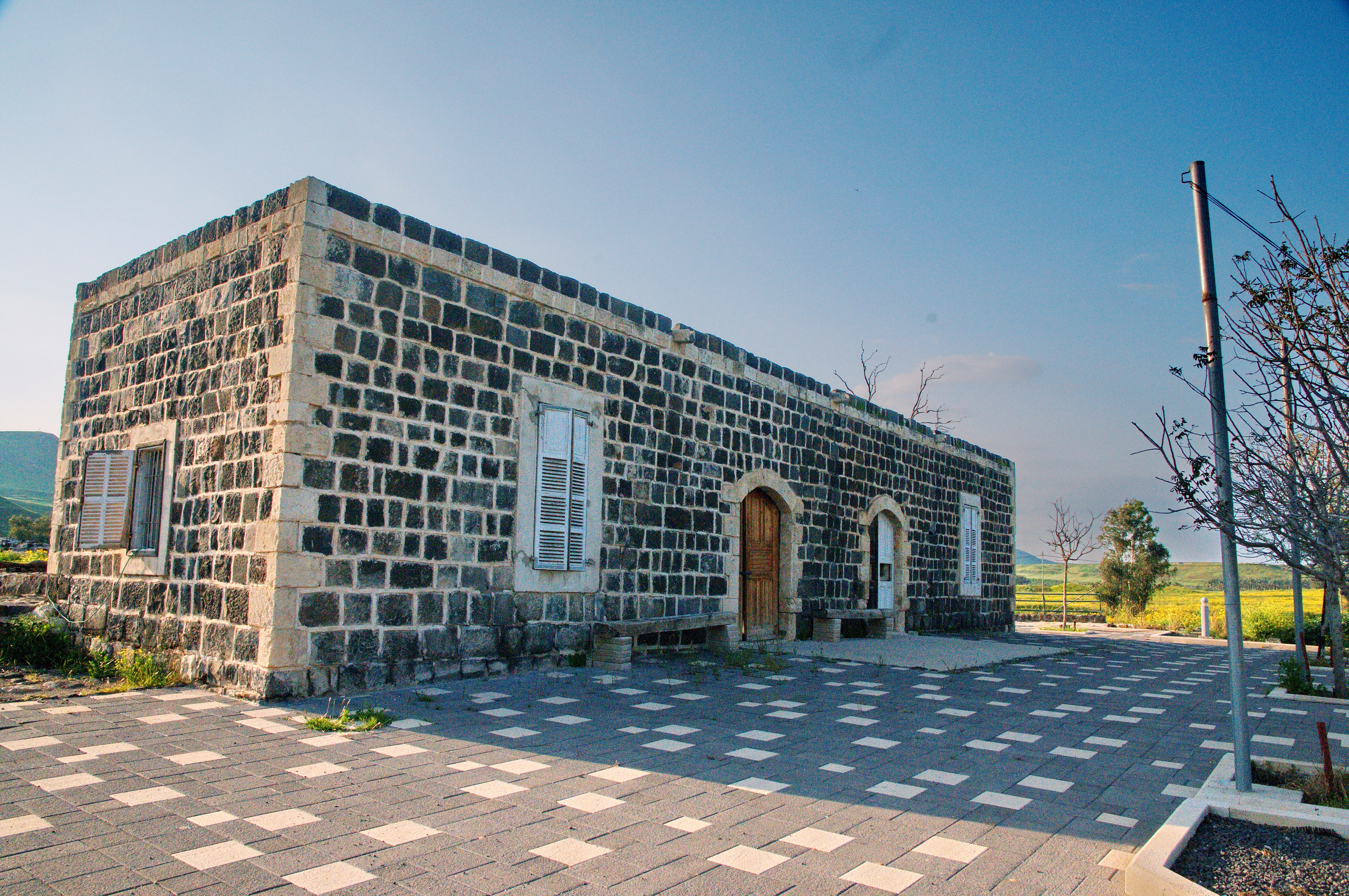 גשר הישנה חוויית נהריים